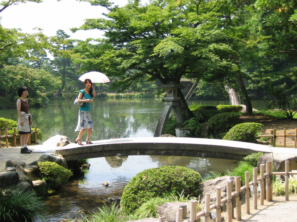 Le pont devant la lanterne kotoji tôrô du jardin Kenrokuen, à Kanazawa, où tout le monde pose inévitablement pour la photo souvenir. (photo prise par Moku le 23 juillet 2004 à 10:46)